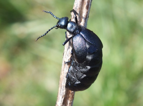 Oleica (Meloe)